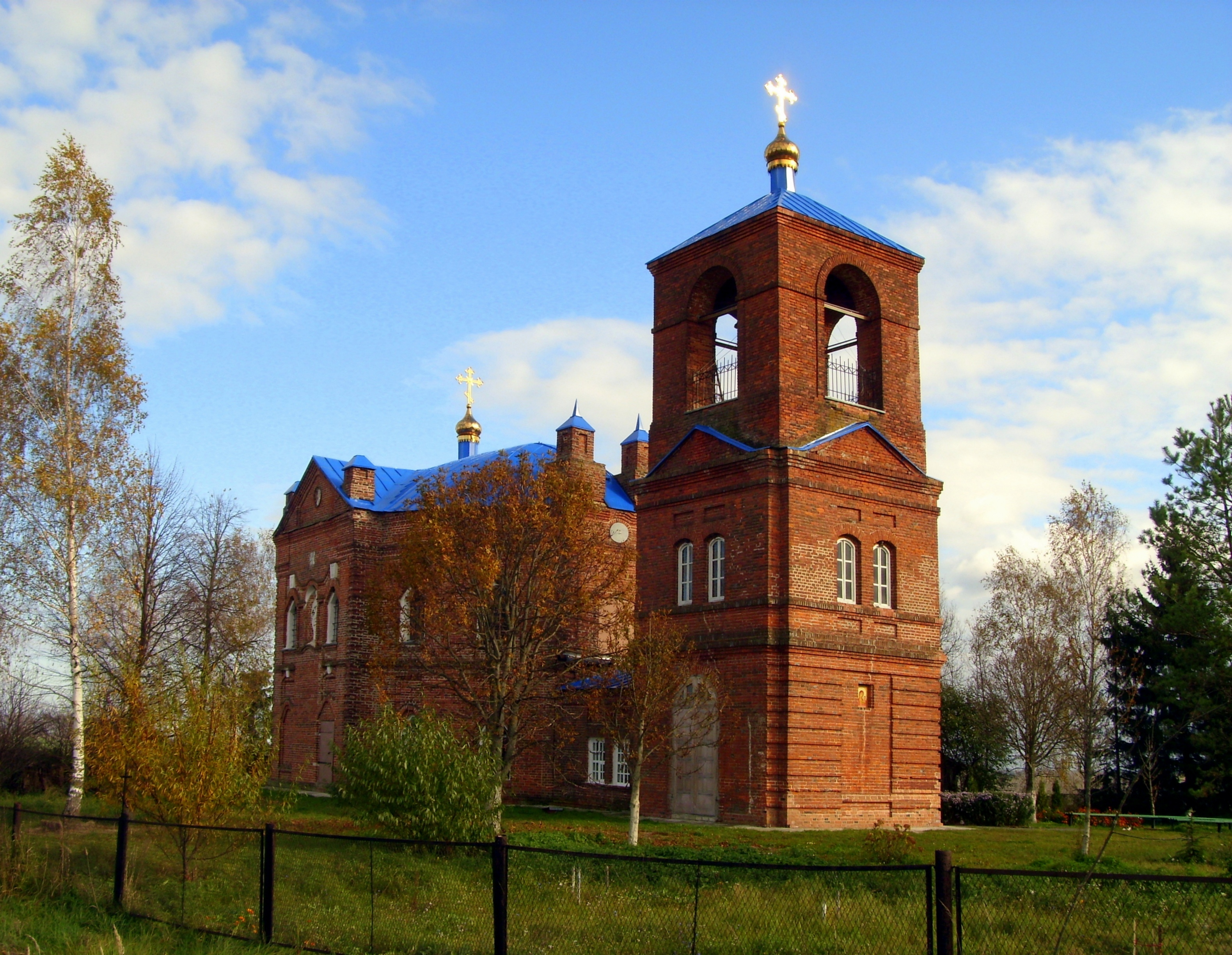 Церковь Преображения (Брянская область, Брянск, село Товарищичи)